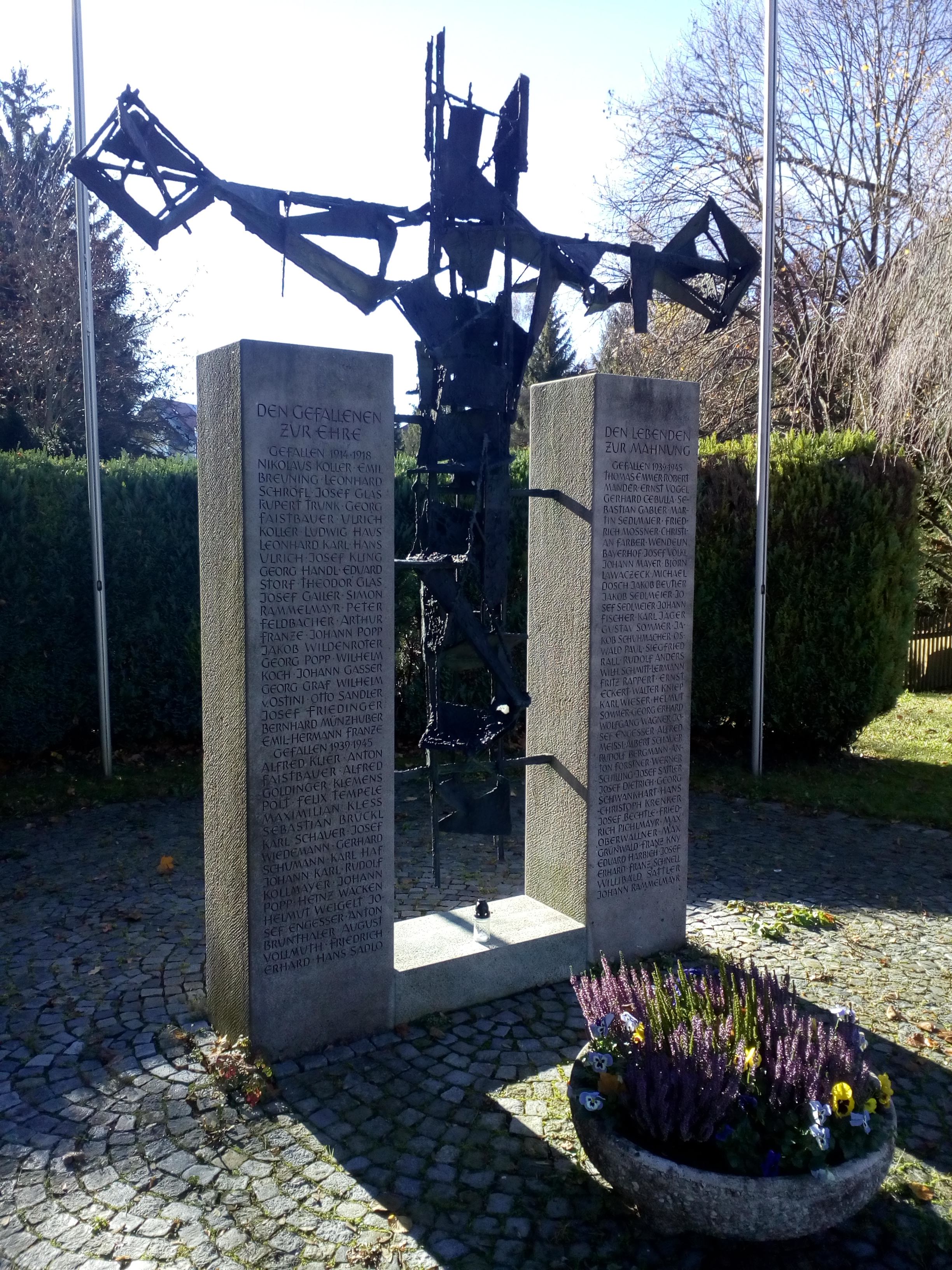 Kriegerdenkmal in Pöcking, Landkreis Starnberg. Geschaffen 1983 von Helmut Ammann.